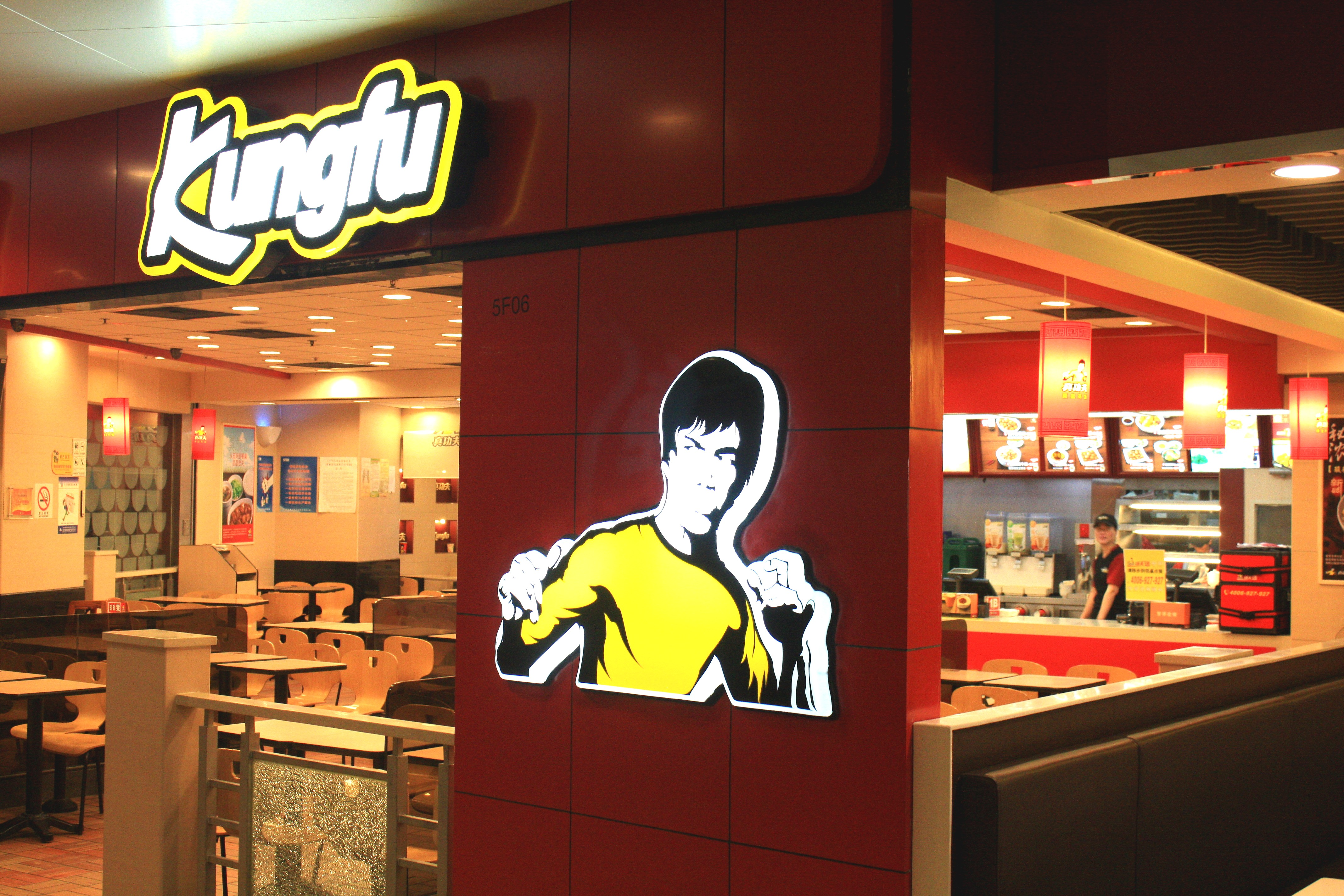 siehe [1]